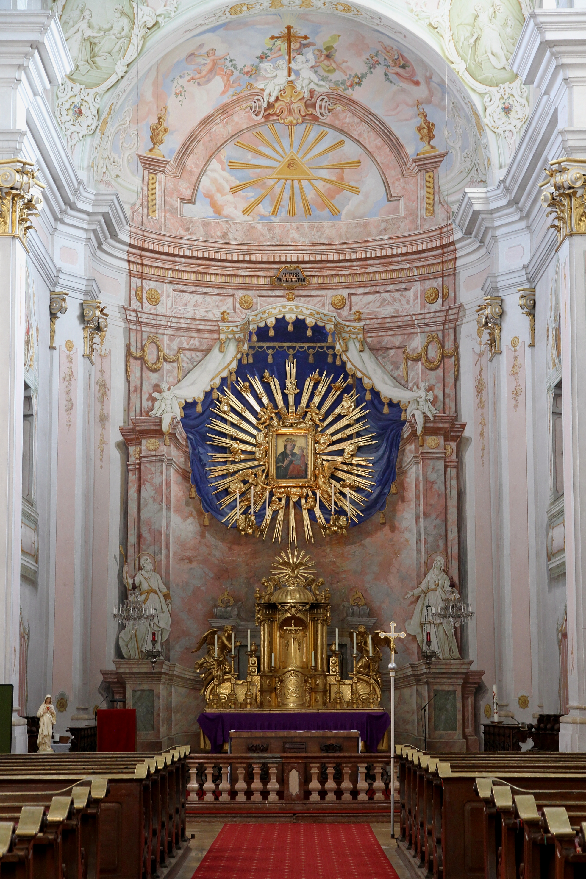 Hochaltar der katholischen Pfarr- und Wallfahrtskirche Mariae Geburt in der niederösterreichischen Ortschaft Maria Langegg mit gemalten Altaraufbauten von Andreas Rudroff (1744–1819).